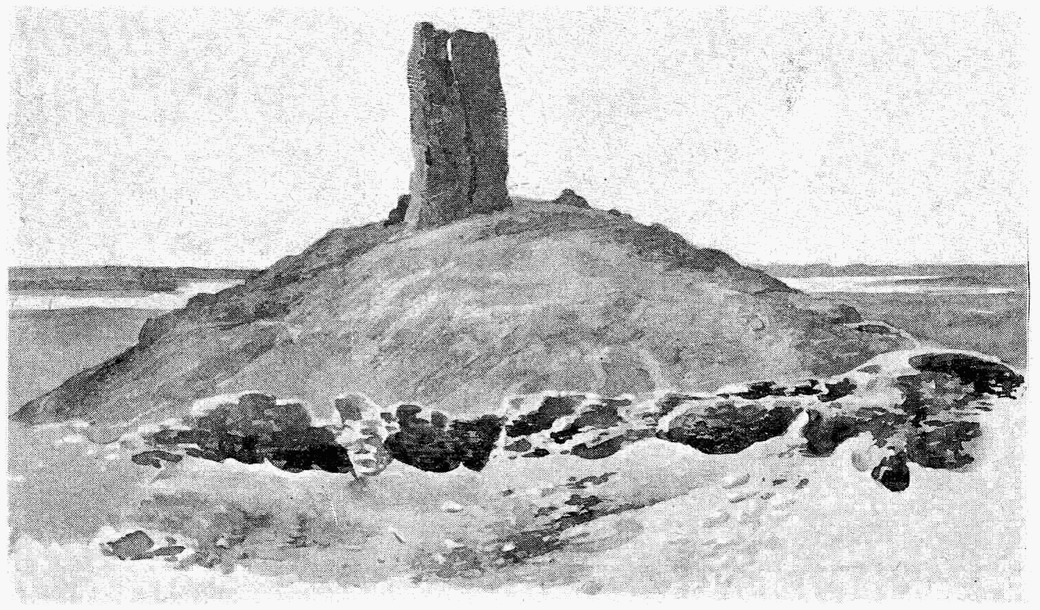 birs-nimrud, ruines de la tour de babel